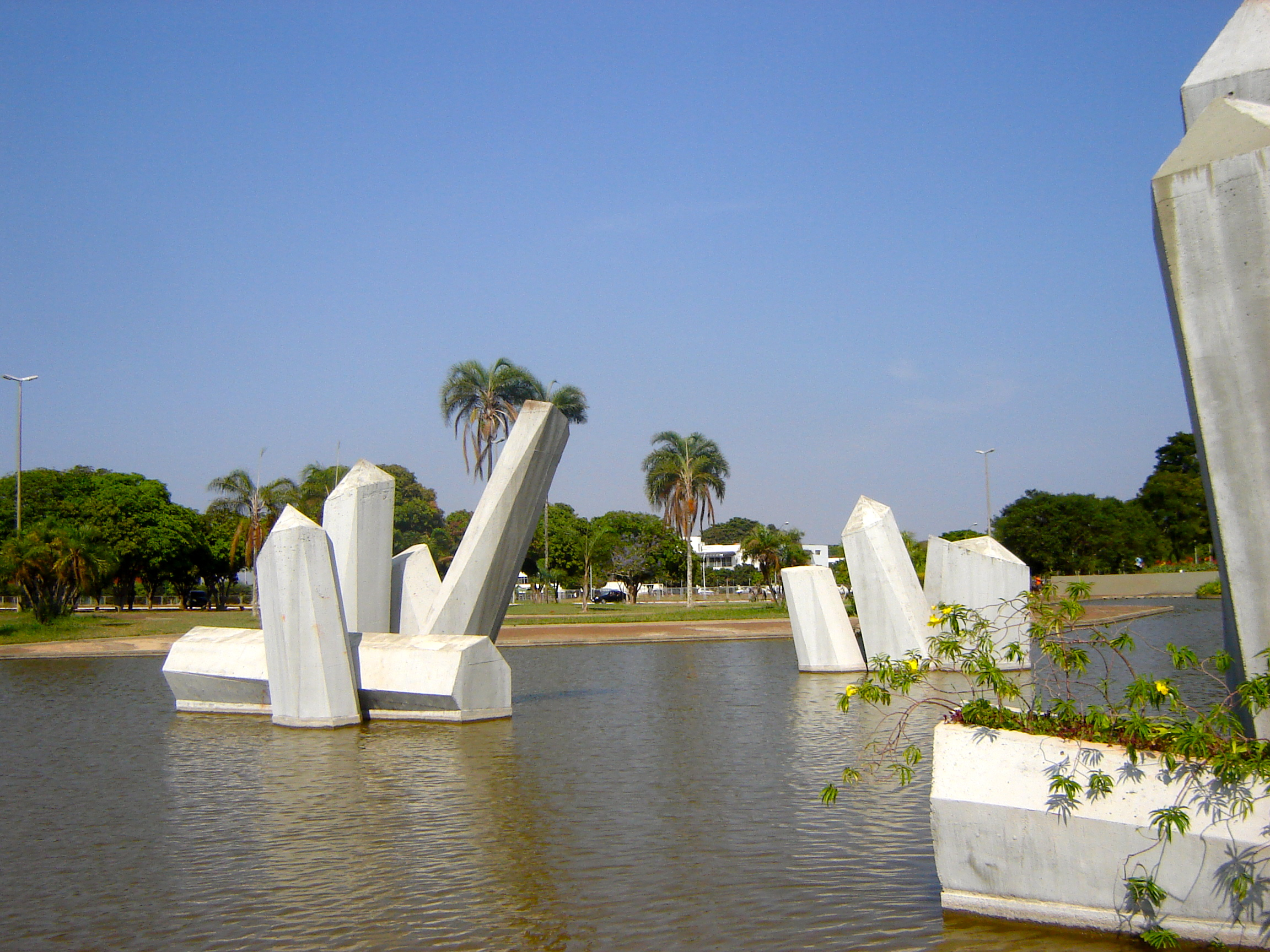 Plaza Cívica (conocida también como "Plaza de los Cristales") en Brasilia, diseñada por el paisajista Roberto Burle Marx.